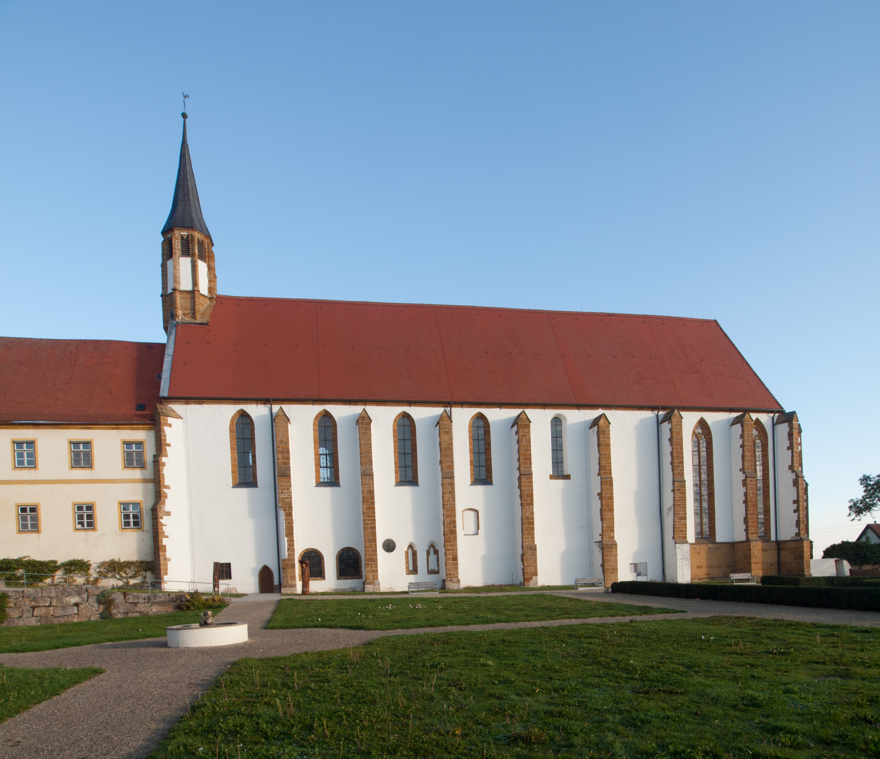 Die ehemalige Klosterkirche, heute Pfarrkirche Mariä Himmelfahrt, in Kirchheim am Ries